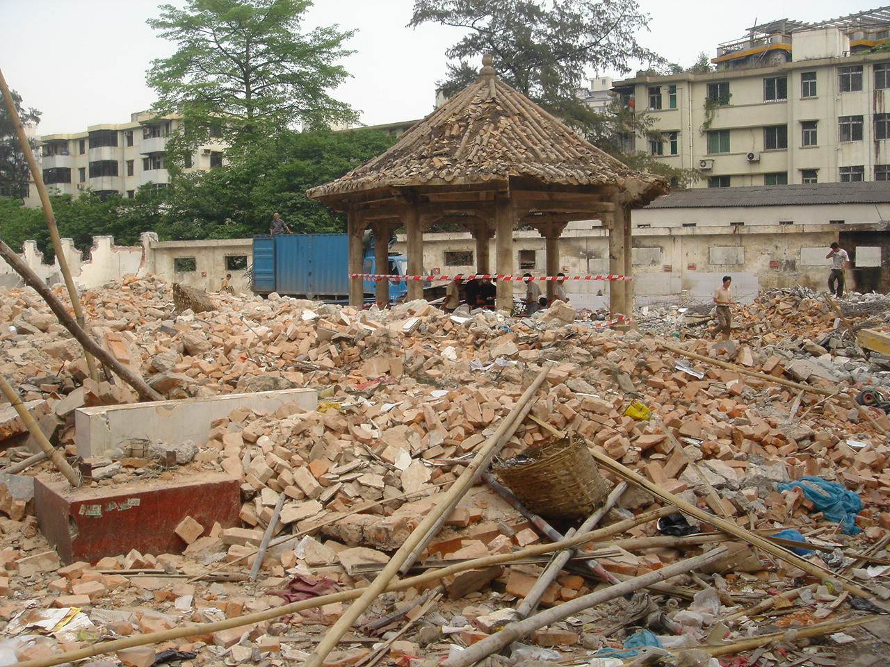 廣州市新一軍印緬陣亡將士公墓紀功亭，正處於廢墟之中。版權說明：使用本相片必須署名「盧潔峰」，否則CC協議將失效，並追究相應的法律責任。